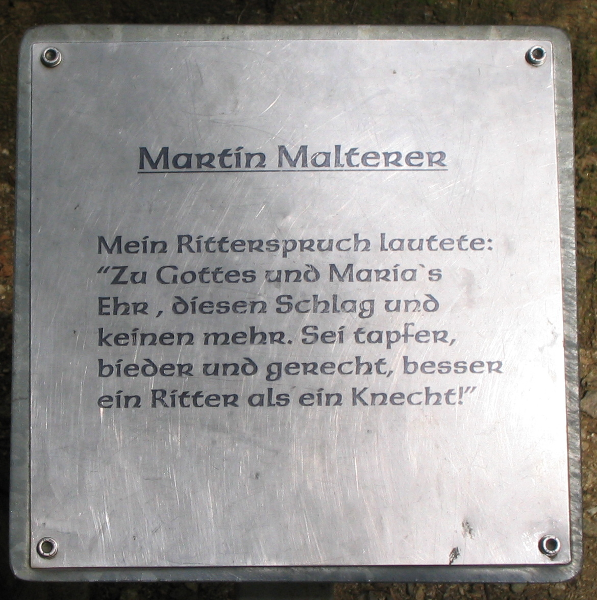 Tafel zur Holzfigur von Martin Malterer auf dem Weg zur Burg in Waldkirch